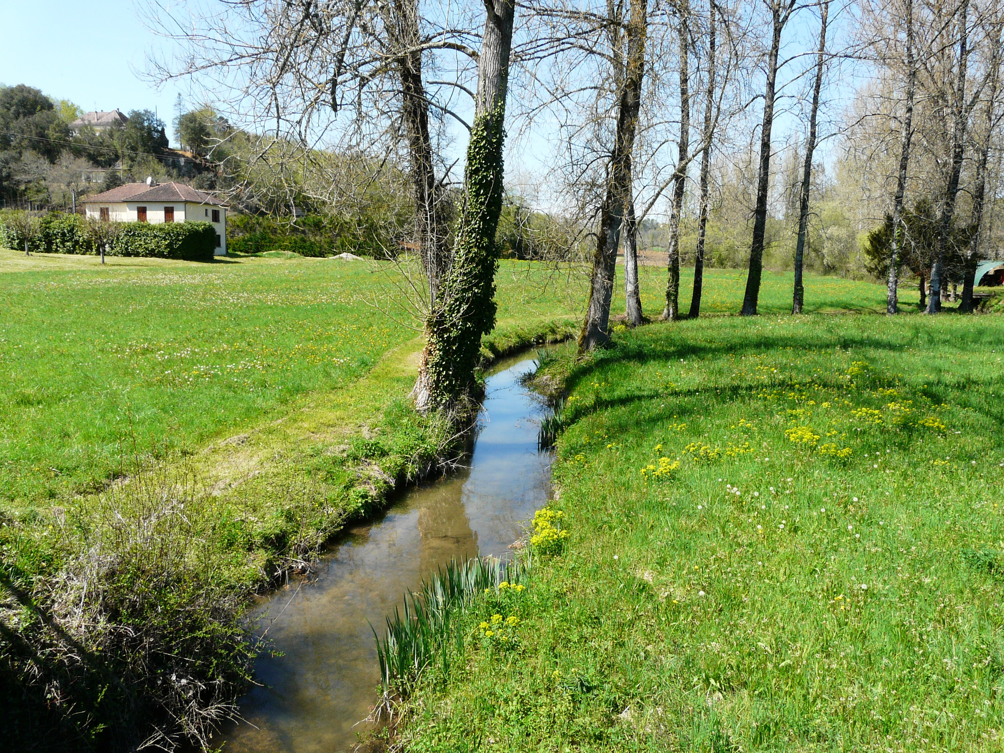 L'Énéa en amont du pont de la route départementale 47, Sainte-Nathalène, Dordogne, France.